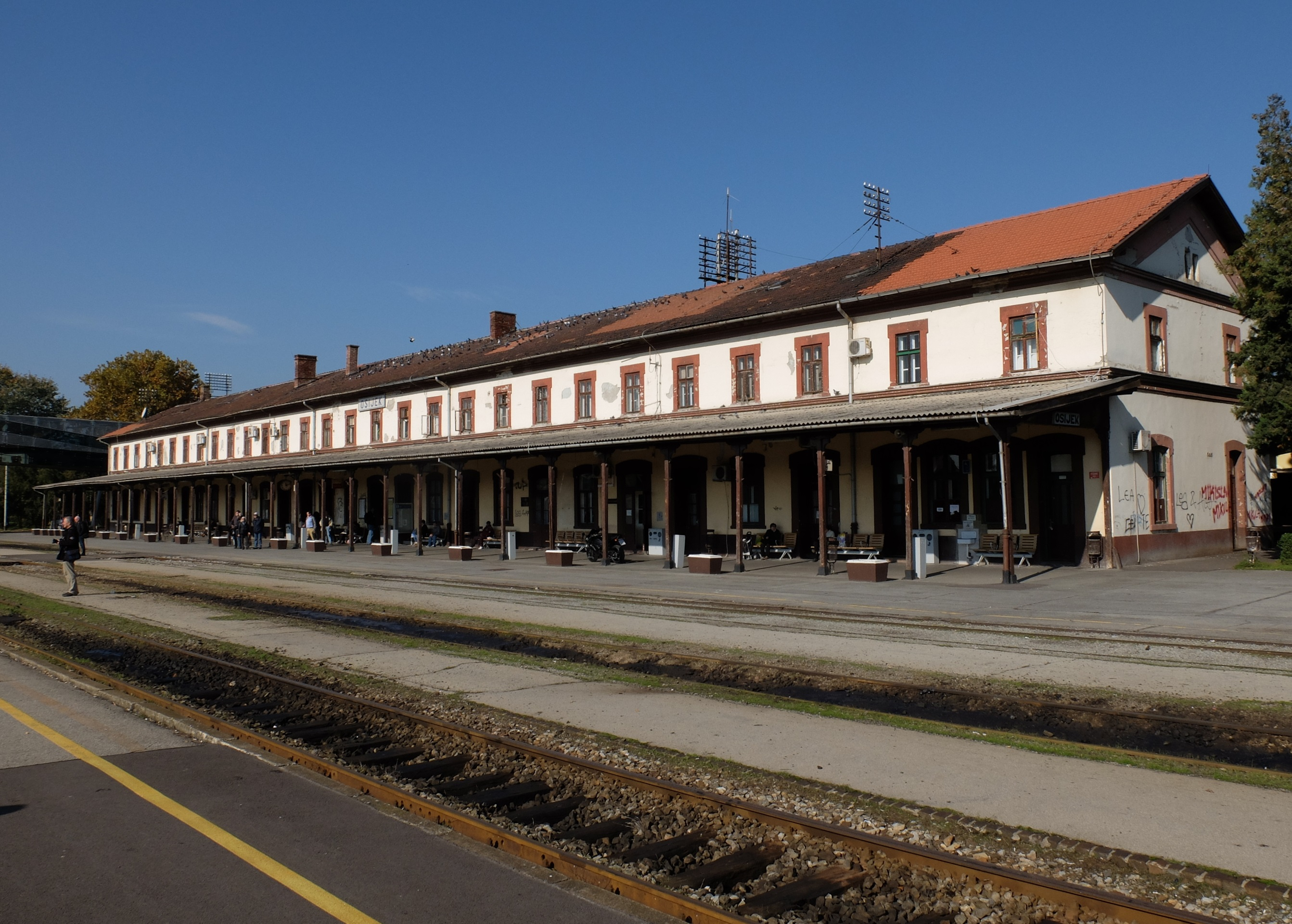 Osijek (Bahnhof)